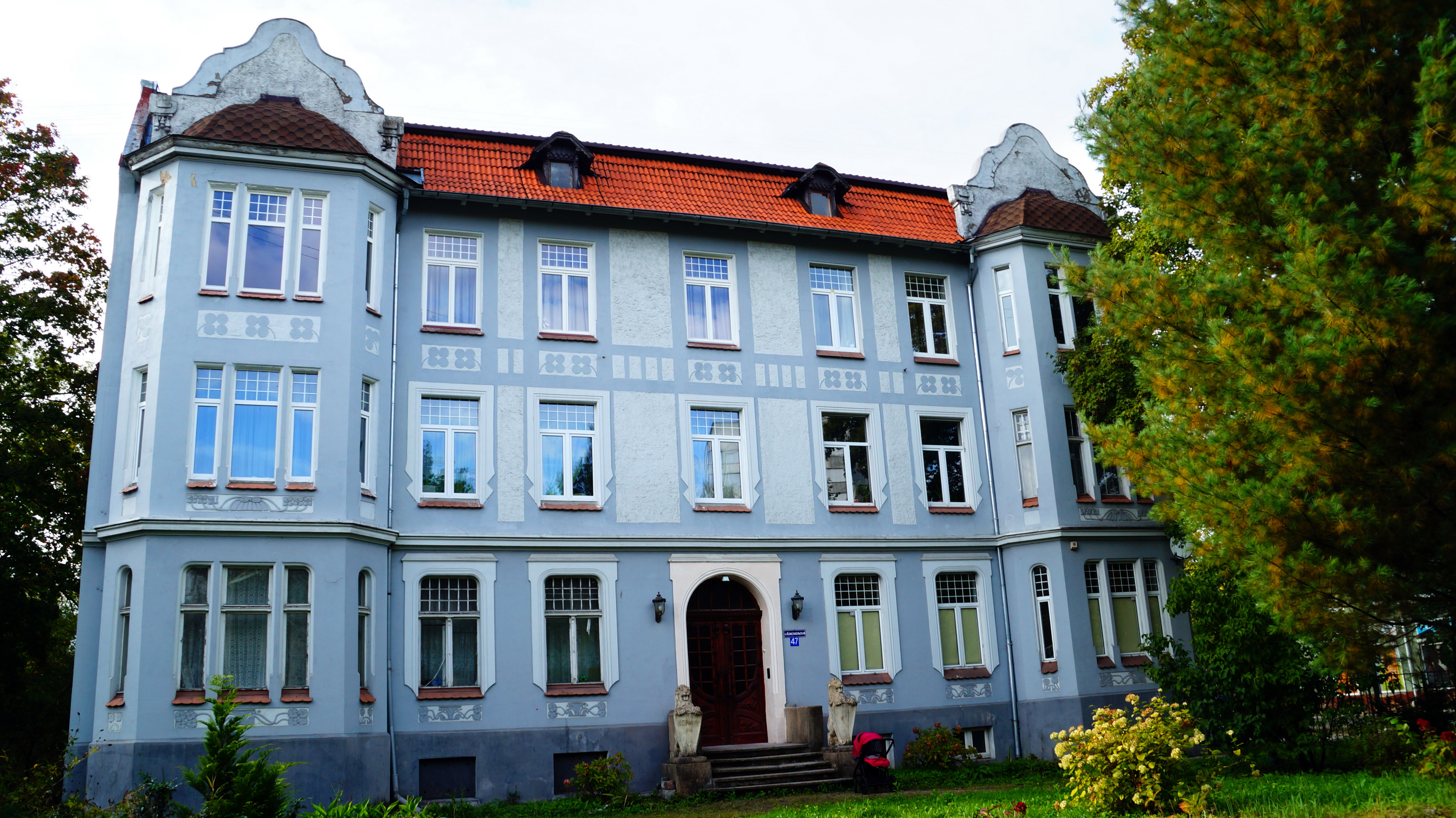 Жилой дом с двумя скульптурами львов у входа: улица Комсомольская, 47, Калининград, Калининградская область